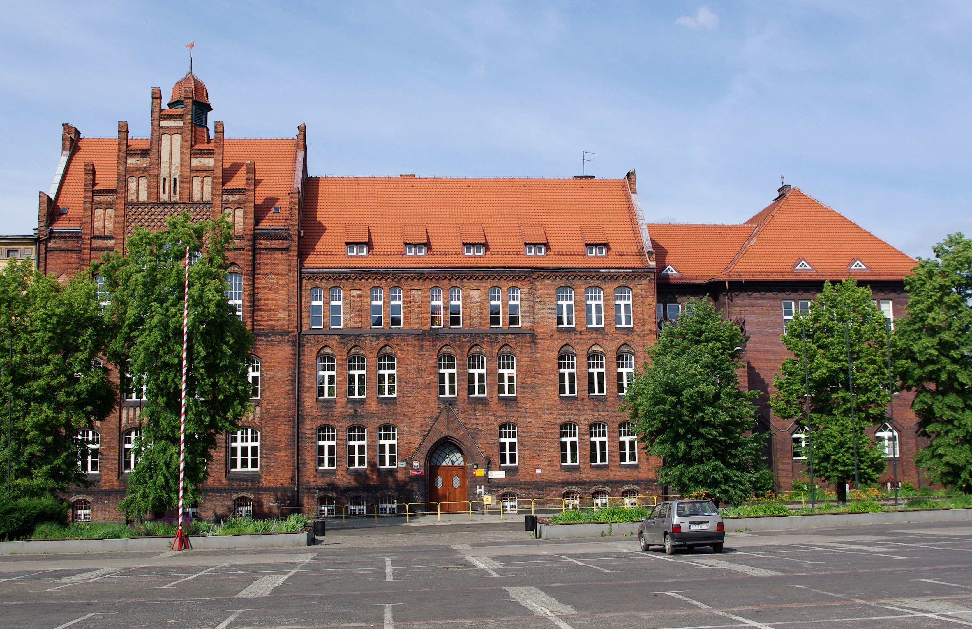 NKJO oraz SP 36 w Zabrzu